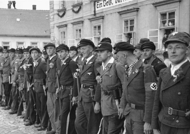 Heeres-Filmstelle Einmarsch in das Sudetenland. Sudetendeutsche Freikorps auf dem Marktplatz zur Begrüßung deutscher Truppen angetreten. Members of the Sudeten-German Volontary Corps are standing by to greet Hitler upon his arrival in Niemes. [Text aus amerikanischer Quelle, Adolf Hitler war nicht in Niemes anwesend] 10.10.1938 Niemes. Sudetenland